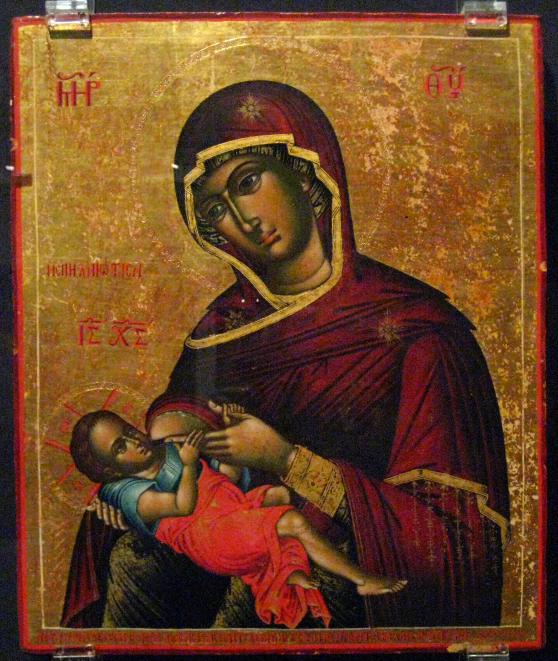 Galaktotrophousa (Spelaiotissa) Master Ioannis, 1778. A.S. Onassis's foundation Млекопитательница Спилеотисса